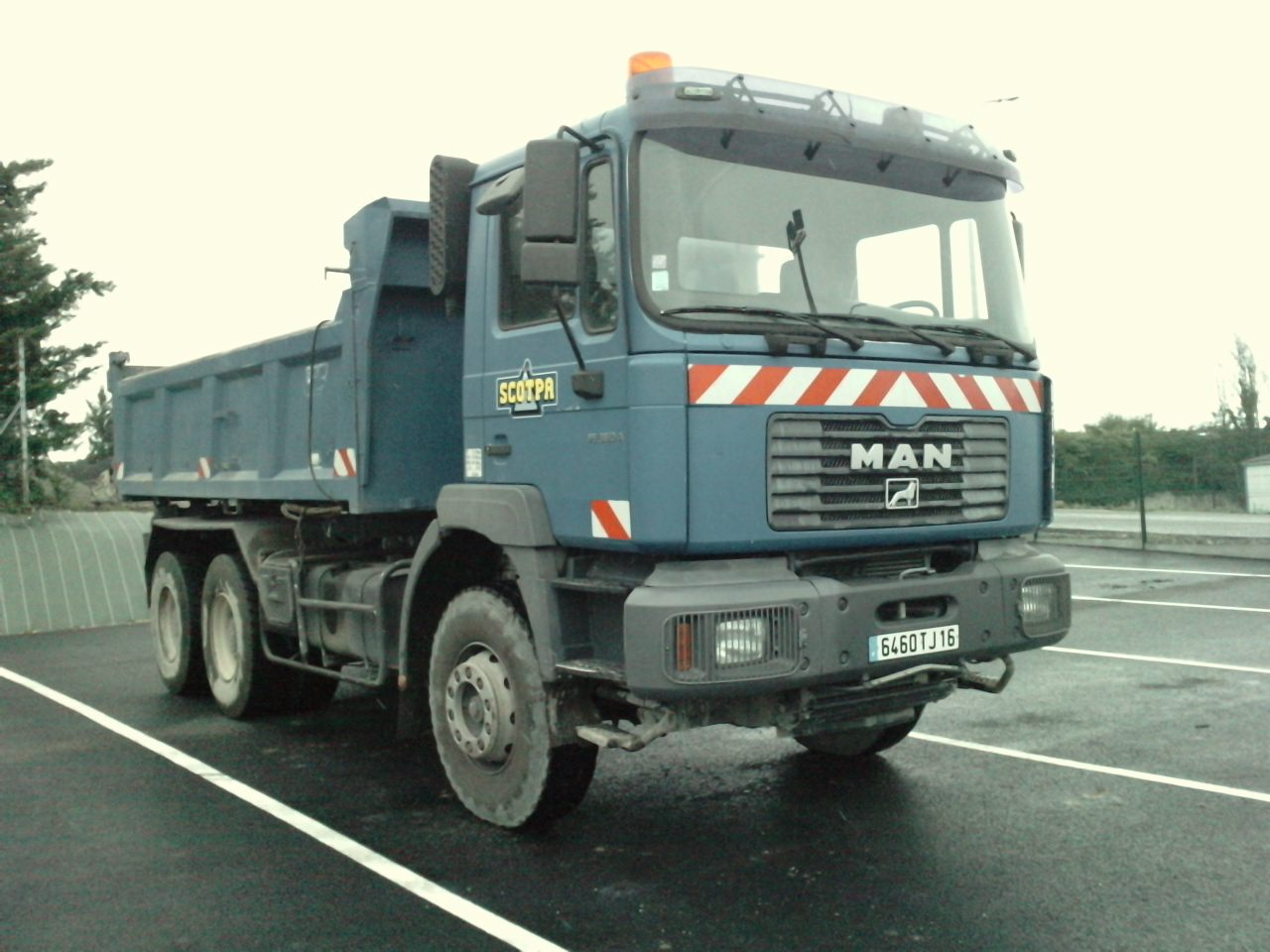 Porteur.